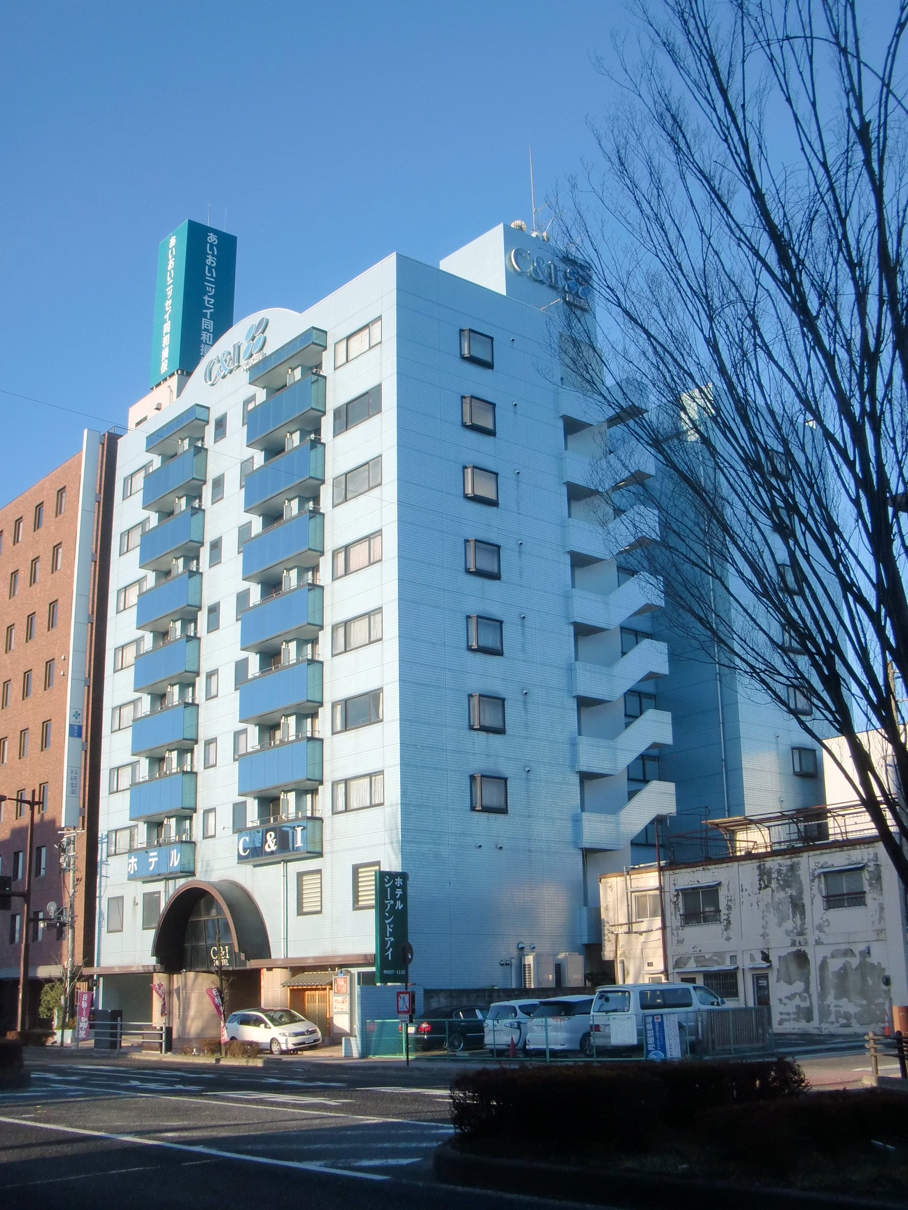 ホテルシーアンドアイ郡山